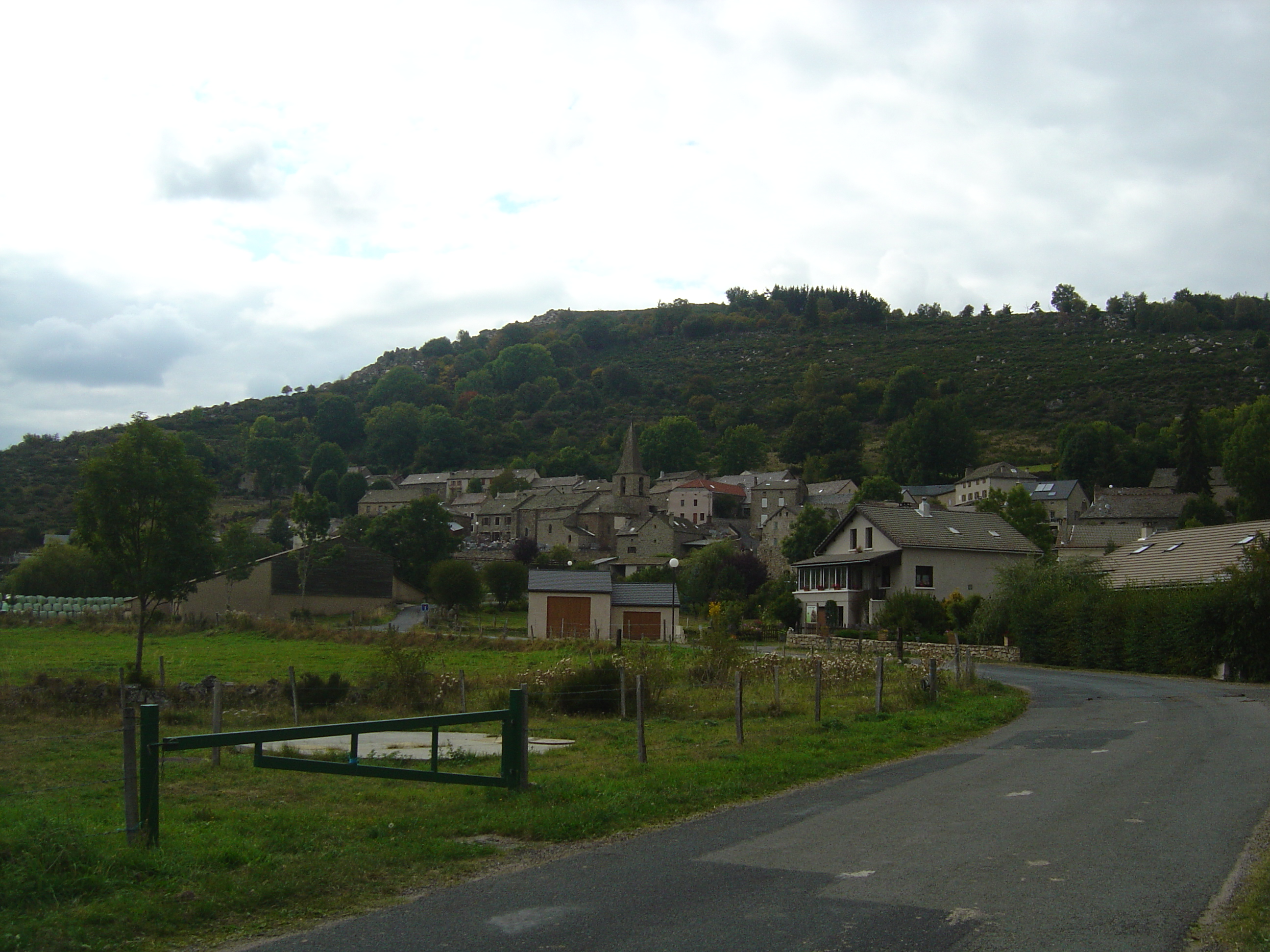 Vue générale du petit village d'Arzenc-de-Randon